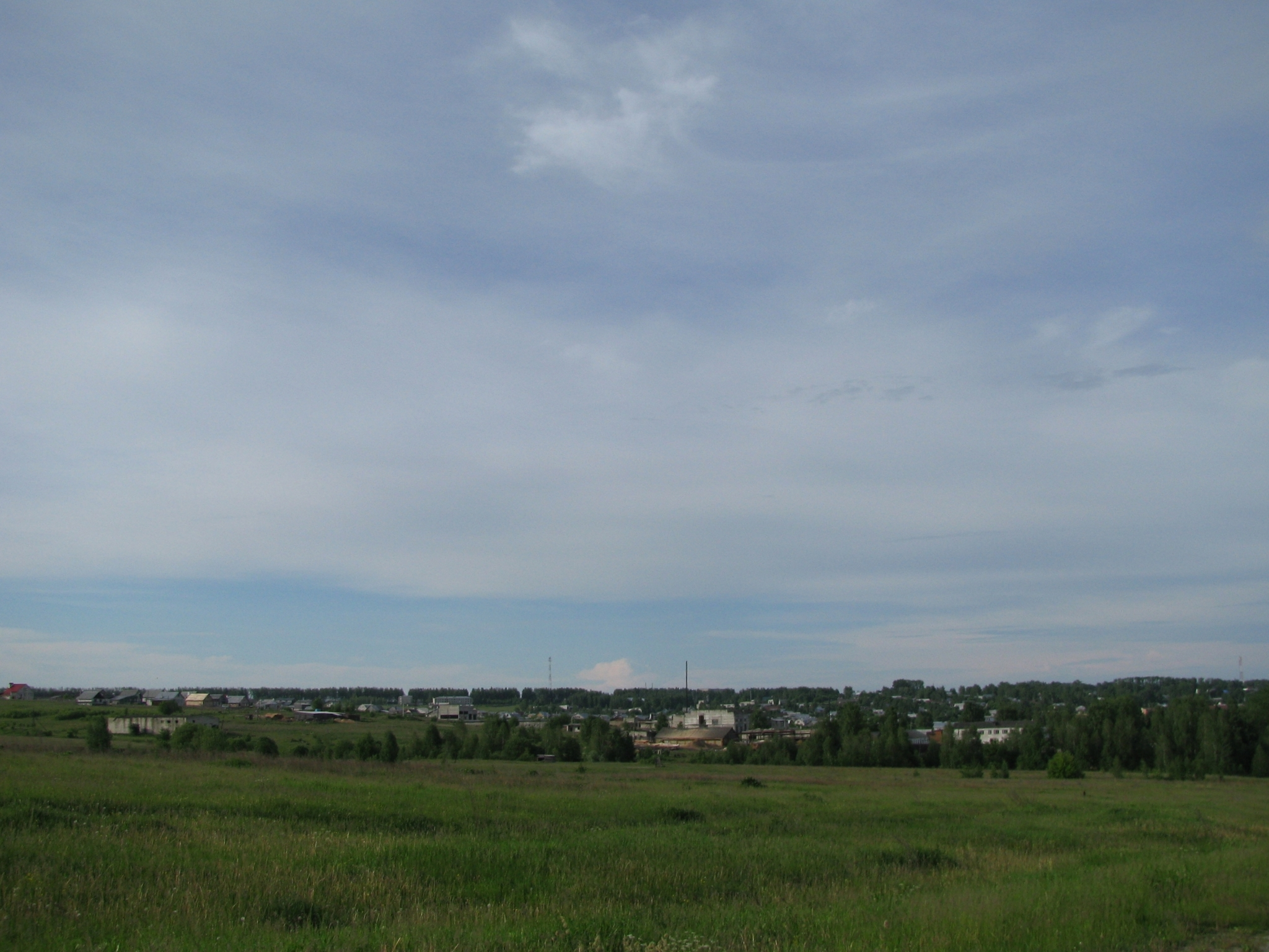 Land over